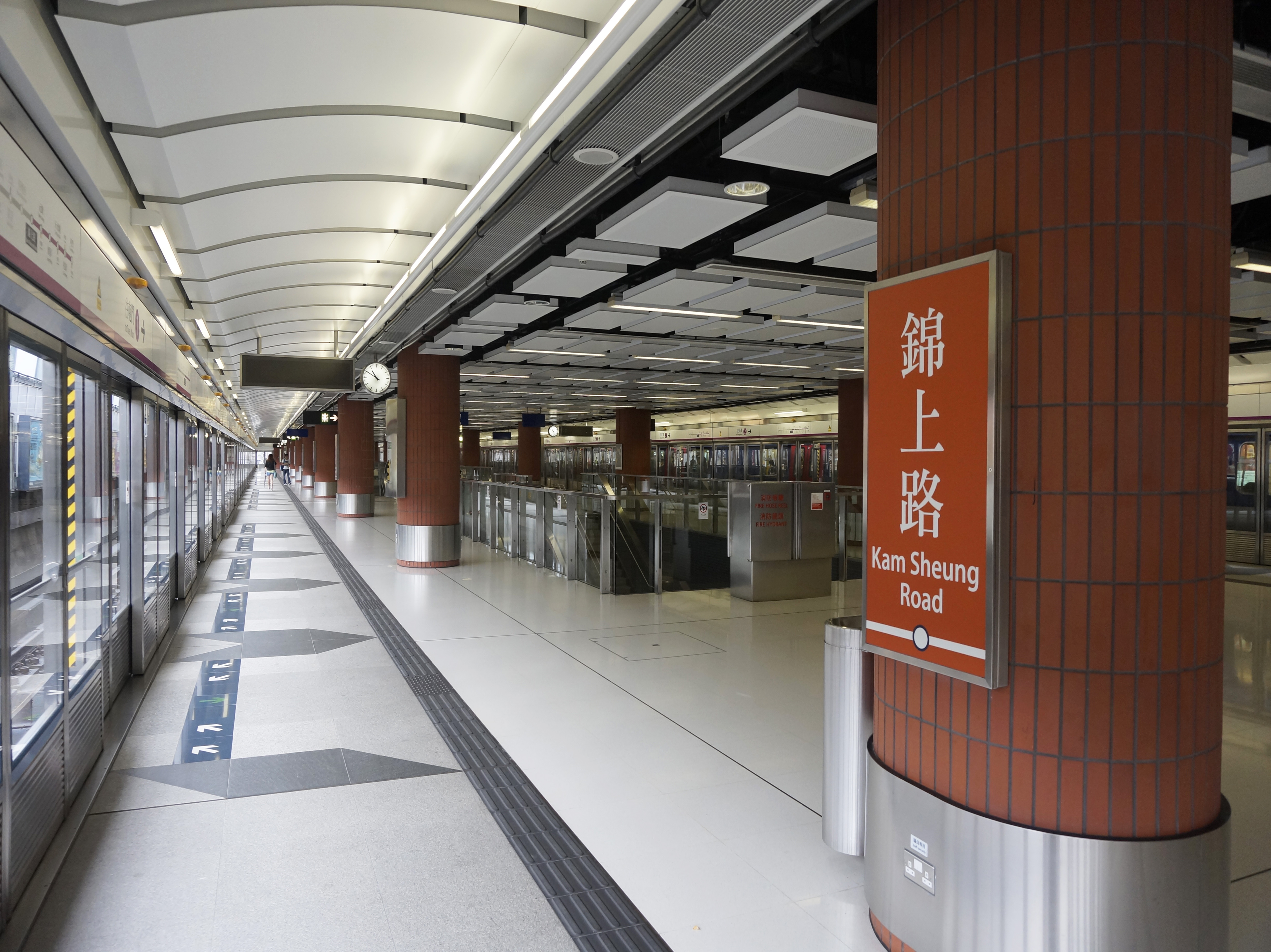 中文（香港）: 港鐵錦上路站月台